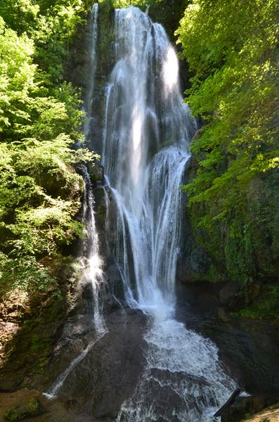 La cascade d'Autoire, 30m